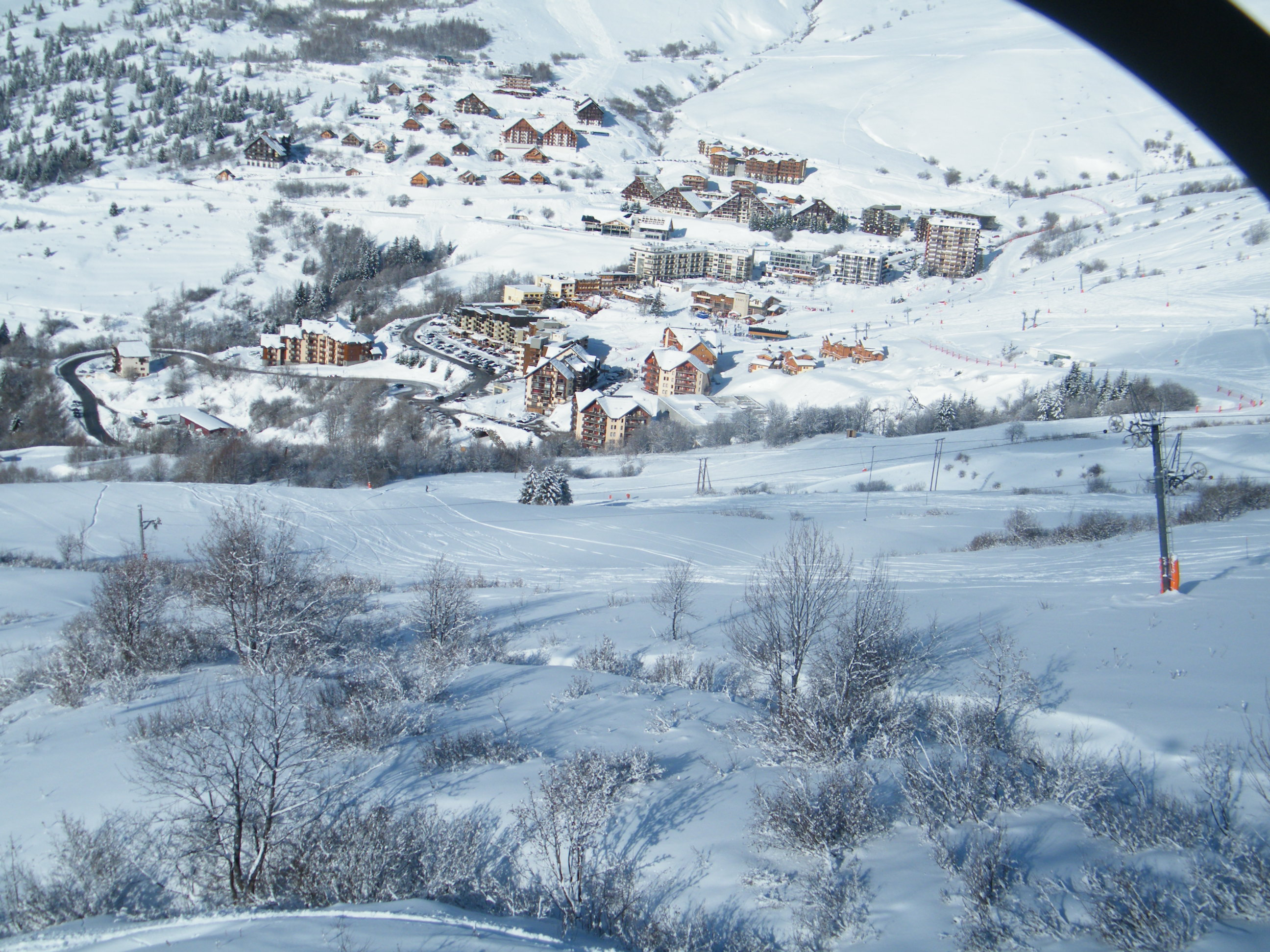 Saint-François-Longchamp